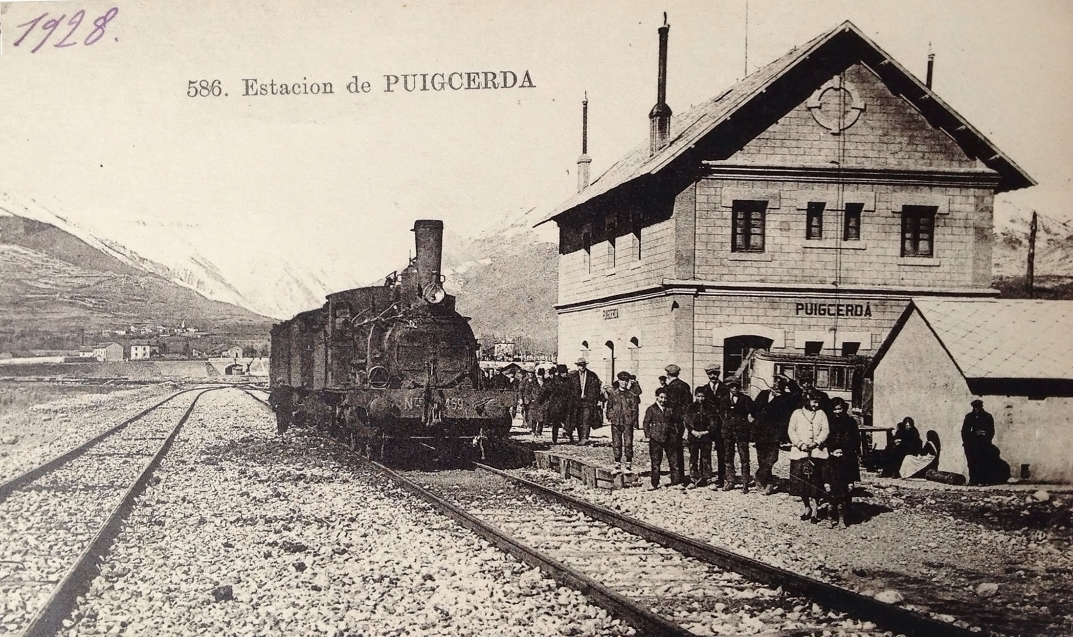 Primera estació de Puigcerdà. Gentilesa arxiu Palau-Costa